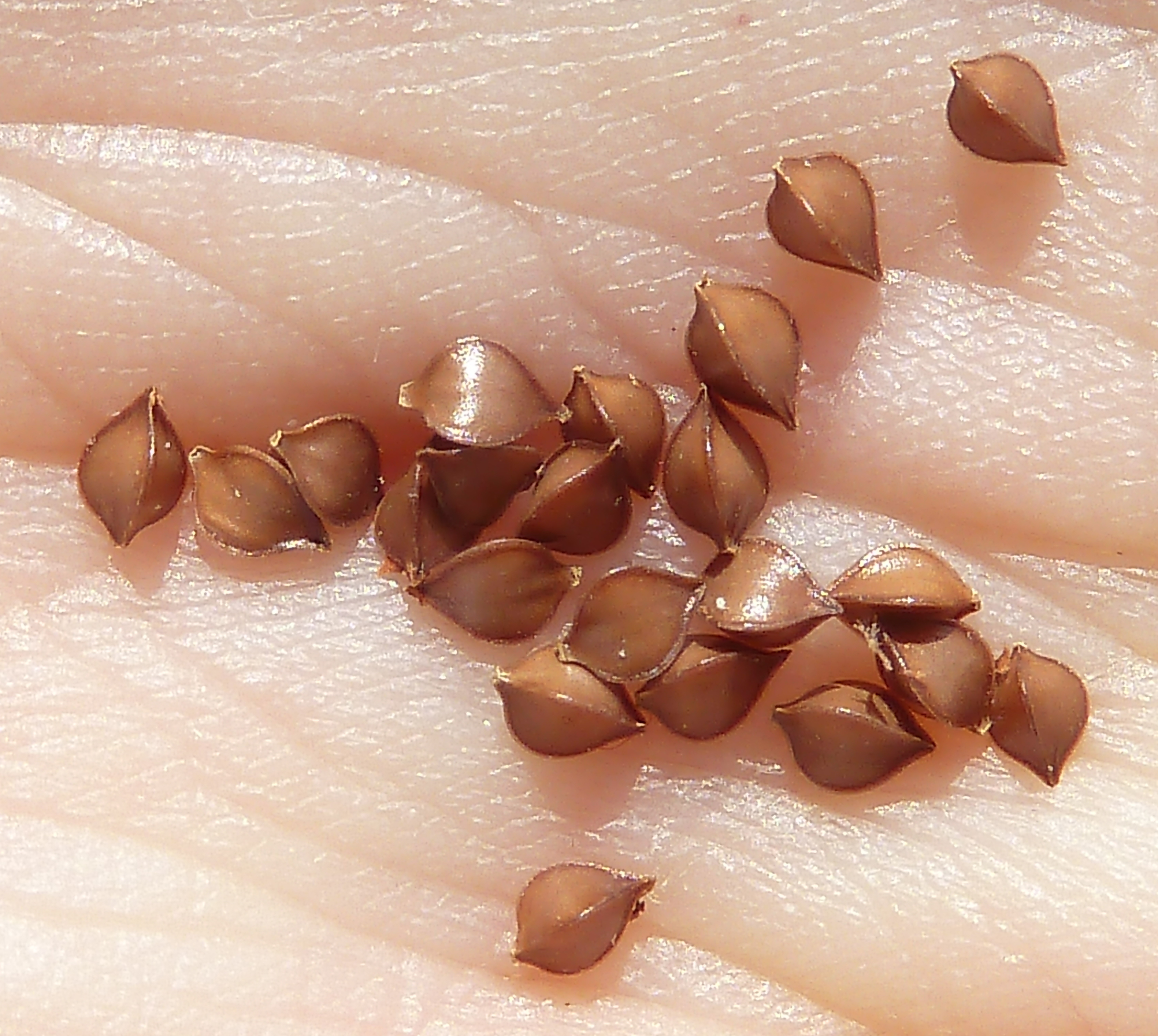 Rumex crispus (romaza, lengua de vaca, vinagrera, ...) - Semillas sueltas. - Camino de la Azarbe de Patricio, Albatera, Provincia de Alicante (España).